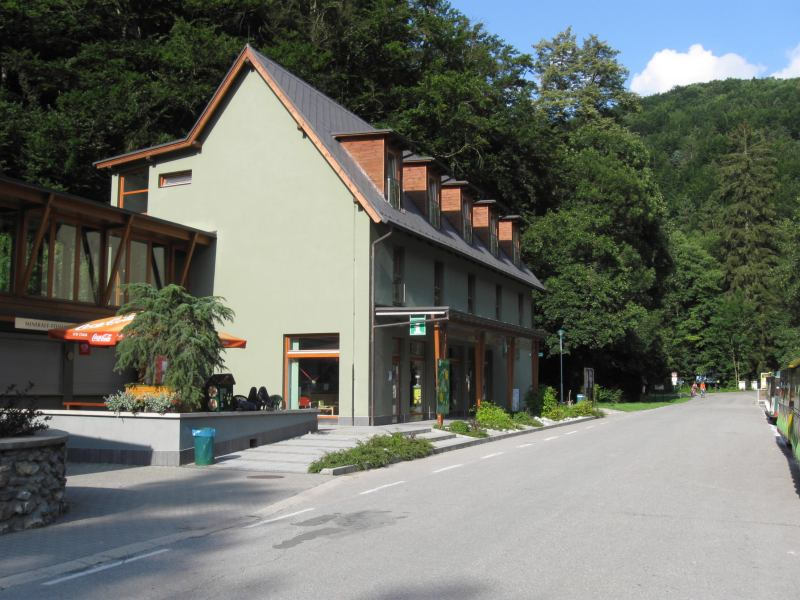 Skalní mlýn